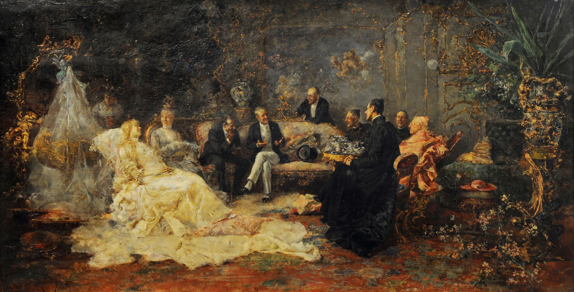 La convaleciente.